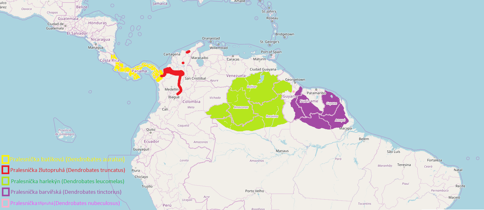 Mapa rozšíření pralesniček rodu Dendrobates